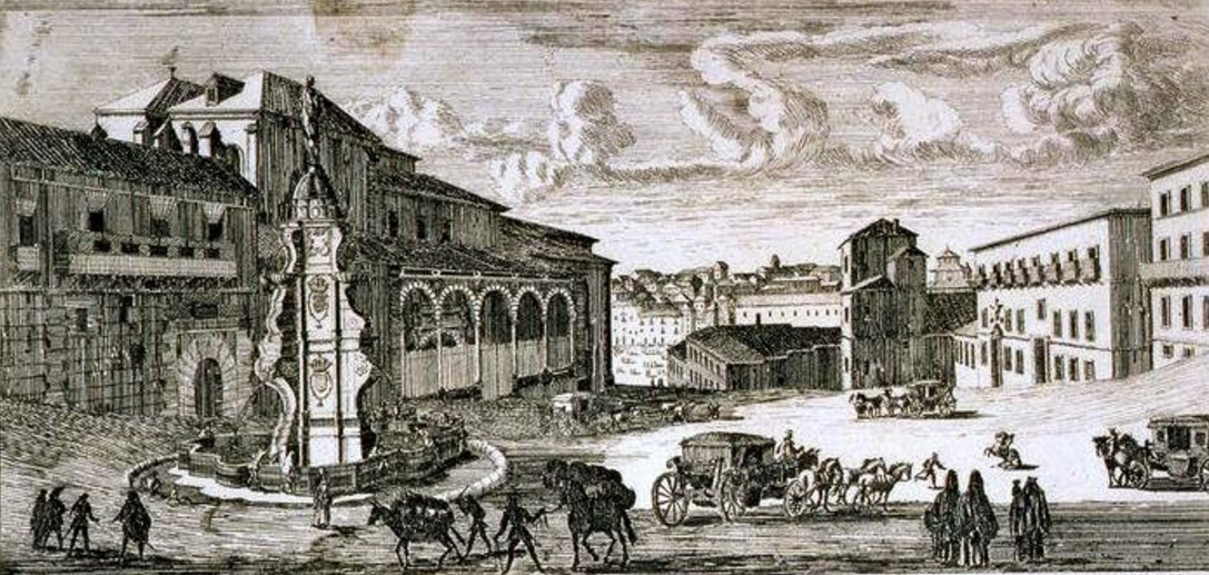 Vista de la Plaza de Santo Domingo de Madrid desde el sur, con la fuente ornamental que entre 1637-1865 estuvo en ese entorno del viejo Madrid. Dibujo hacia 1660 y grabado de Louis Meunier. Cobre, talla dulce.